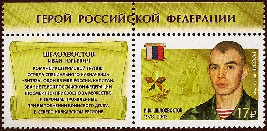 Почтовая марка России 2015 года. Герои РФ. Шелохвостов И.Ю.